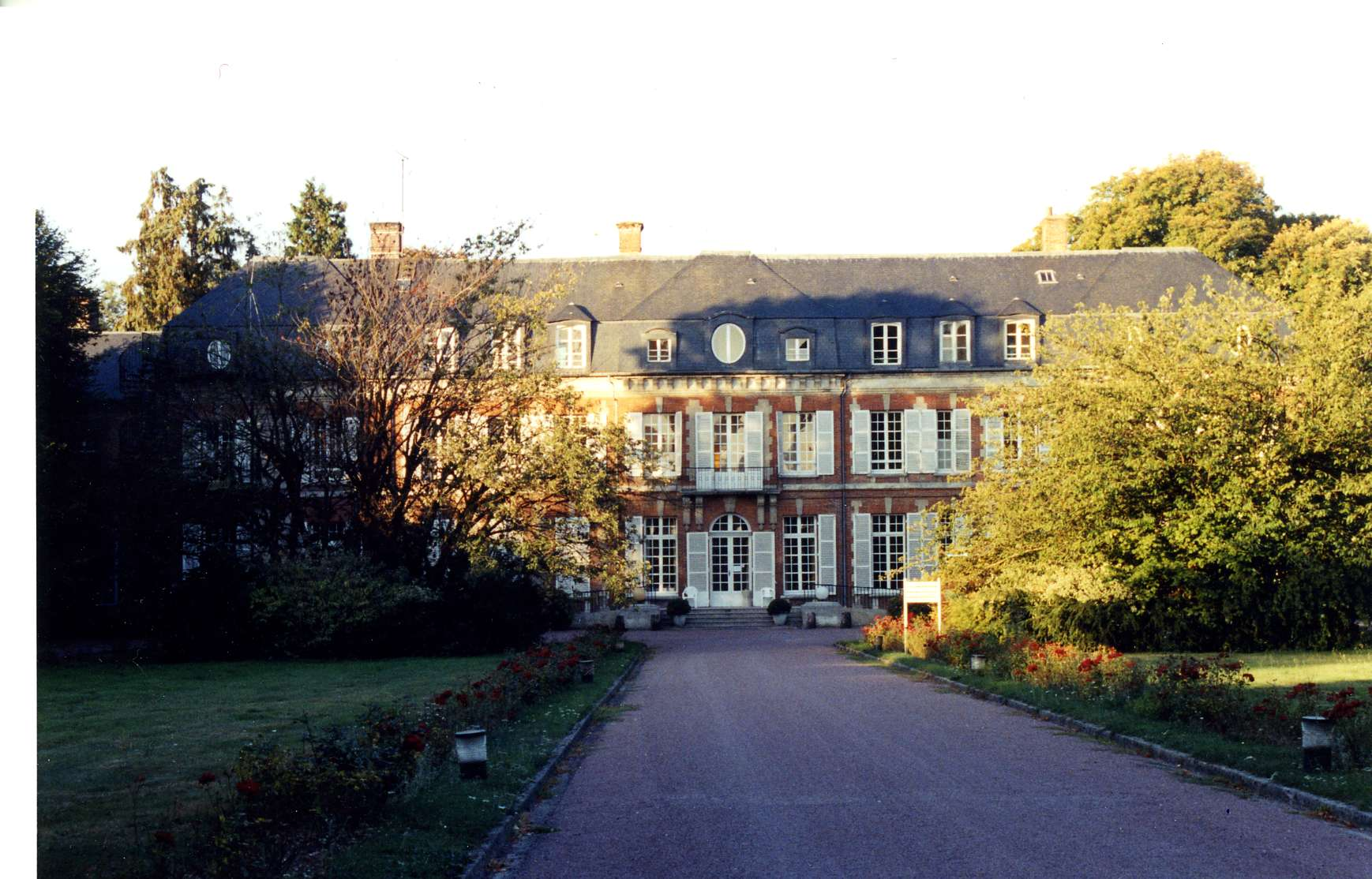 La Houssoye(Oise) Château